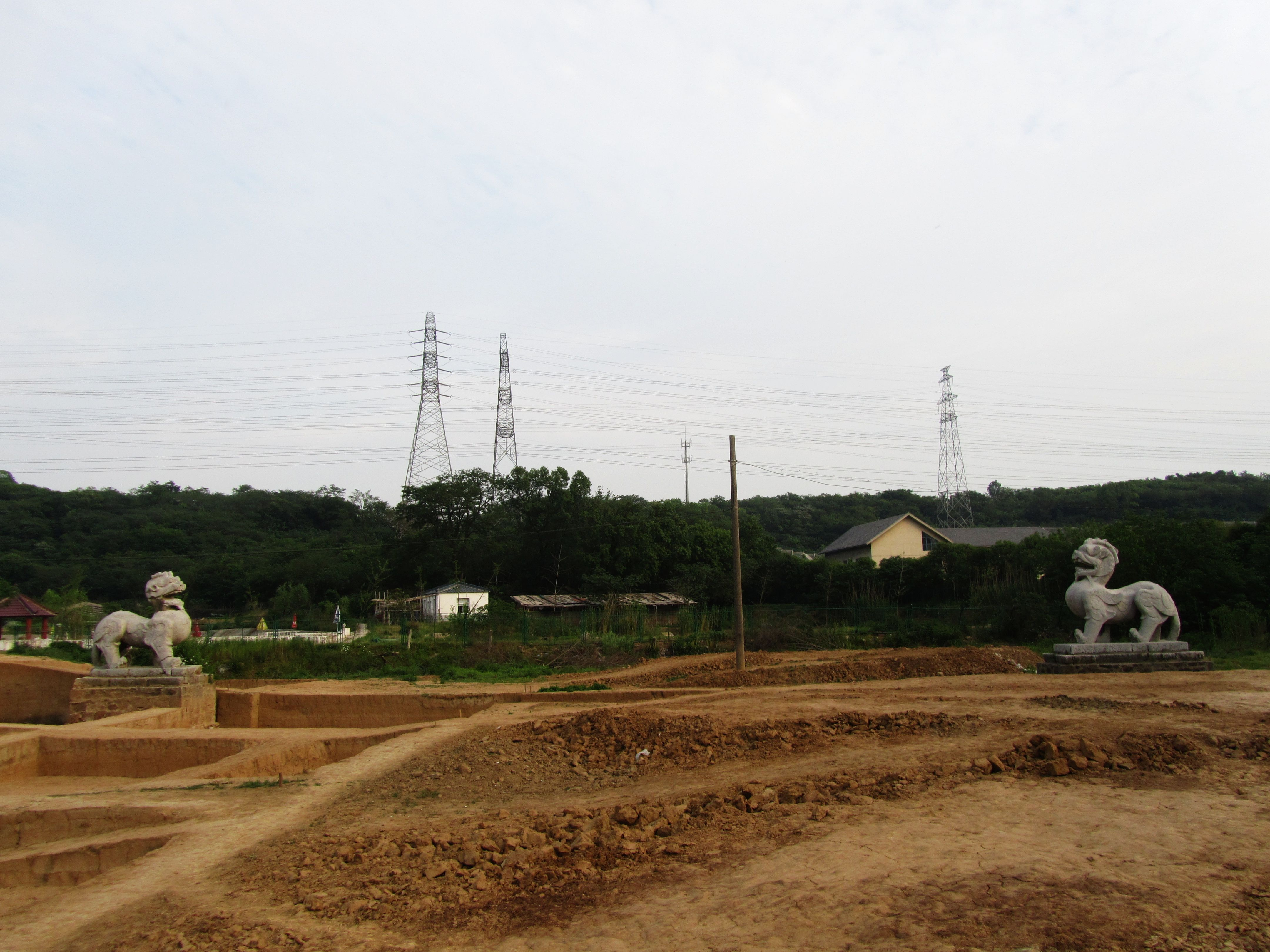 永宁陵，自北侧看麒麟和天禄，东兽（左）为双角天禄，西兽（右）为独角麒麟。